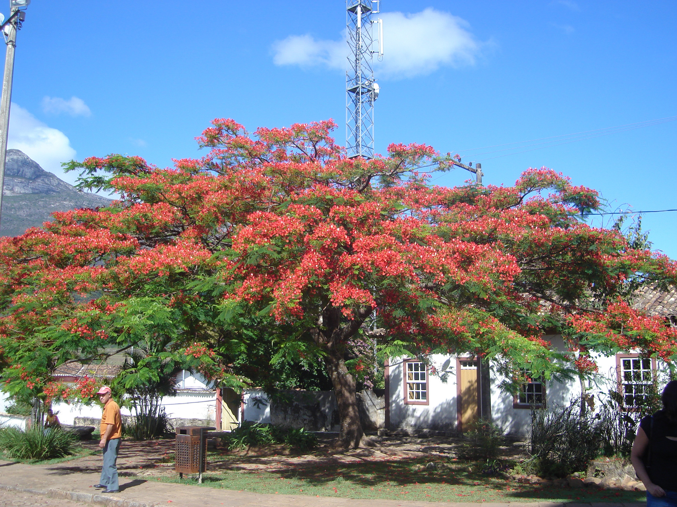 Centro Histórico de Catas Altas, Minas Gerais, Brazil. Historical center of Catas Altas, Minas Gerais, Brazil.